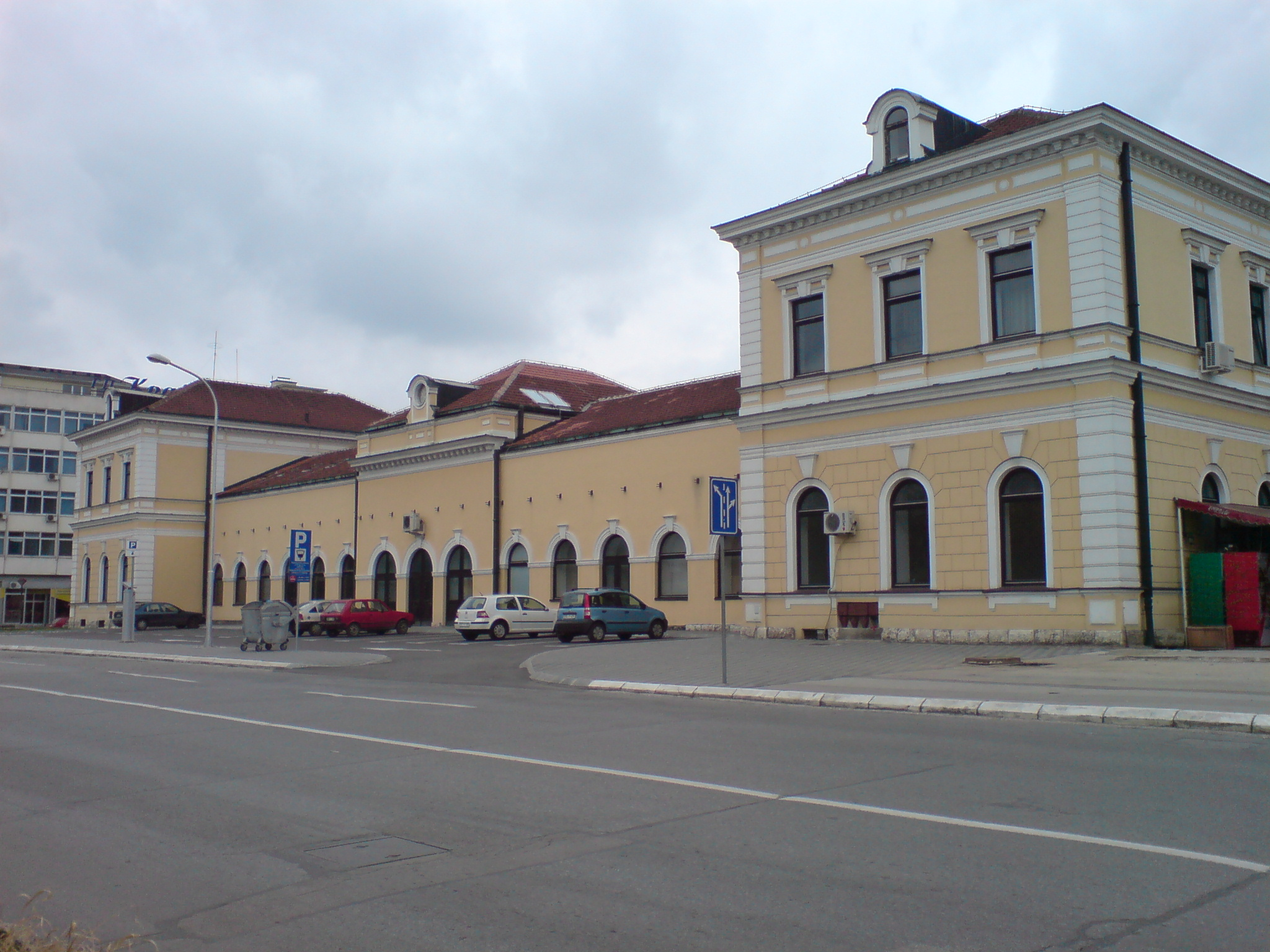 Der von Österreich-Ungarn gebaute Hauptbahnhof in Banja Luka, Bosnien. Baujahr ist 1891.